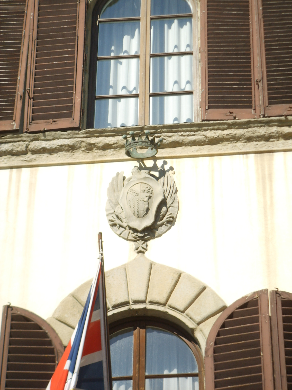 Palazzo gianfigliazzi 2, stemma